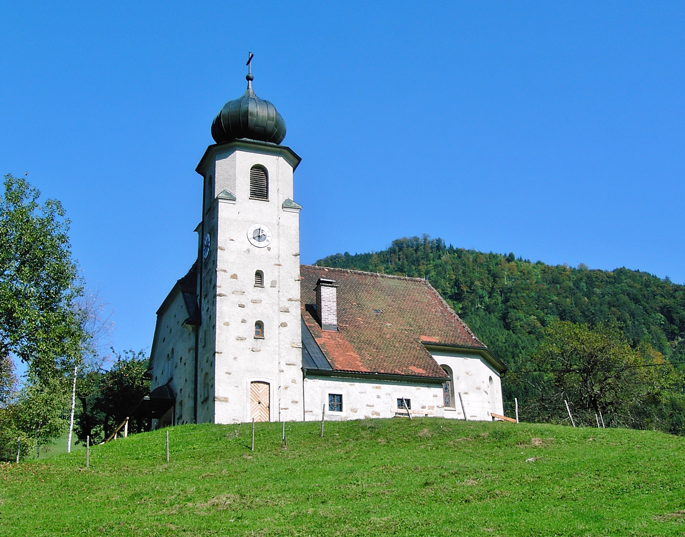 Großraming Katholische Filialkirche Brunnbach, Ansicht von Süden